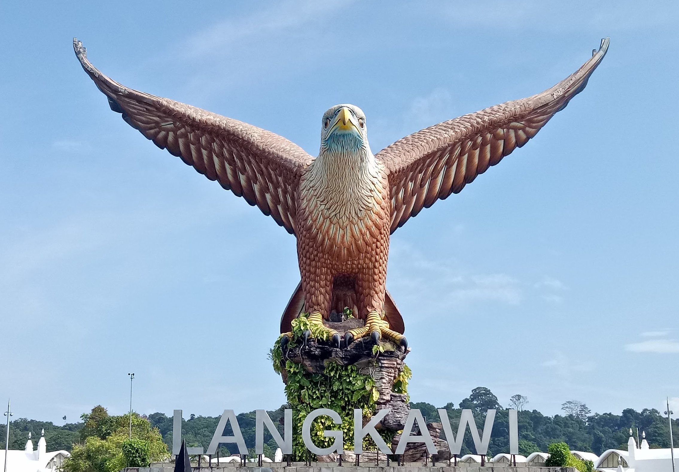 Keadaan Dataran Lang, ketika tahun 2018.